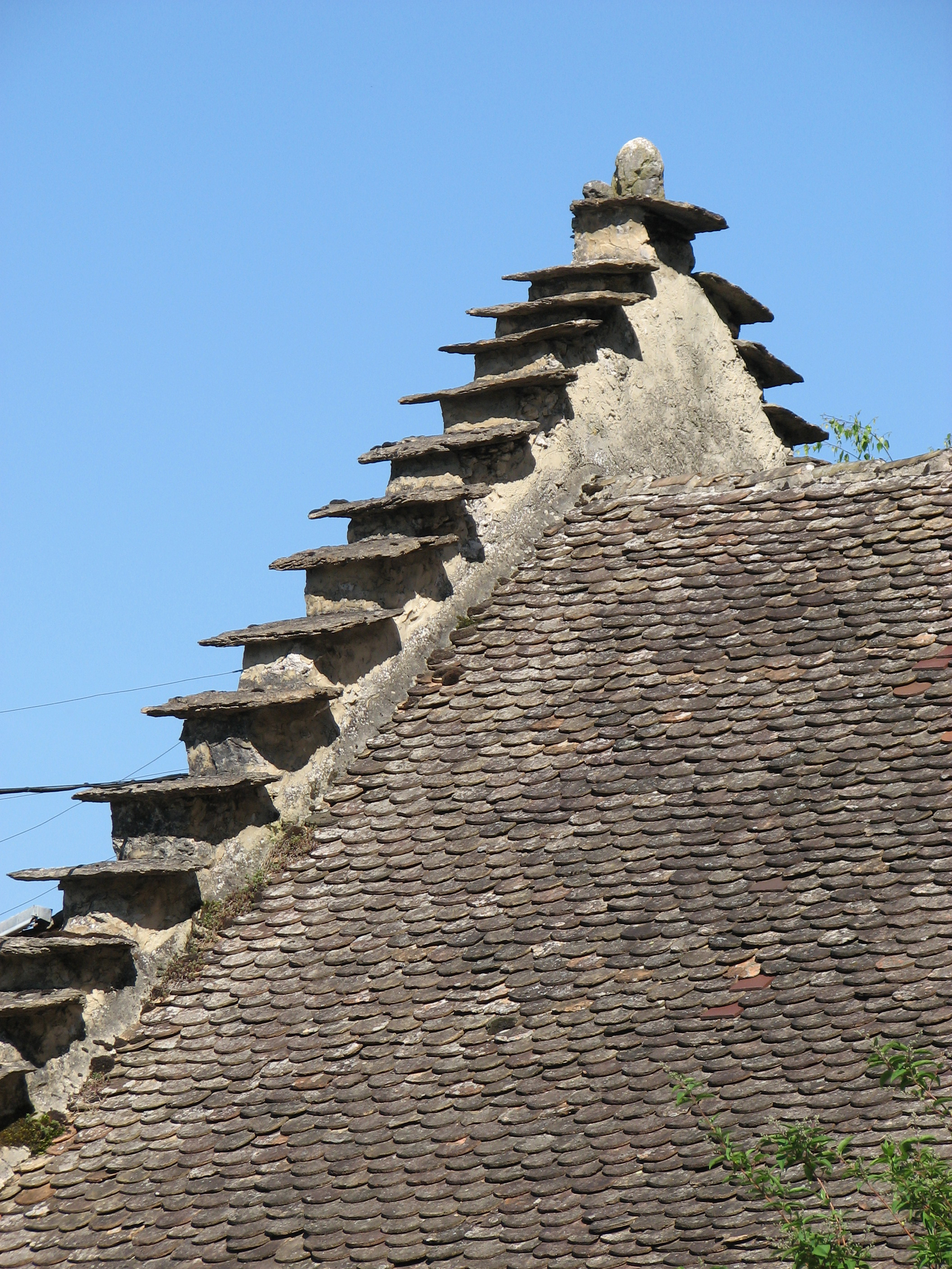 Exemple de toit à redent. Maison de Brégnier-Cordon (Ain)